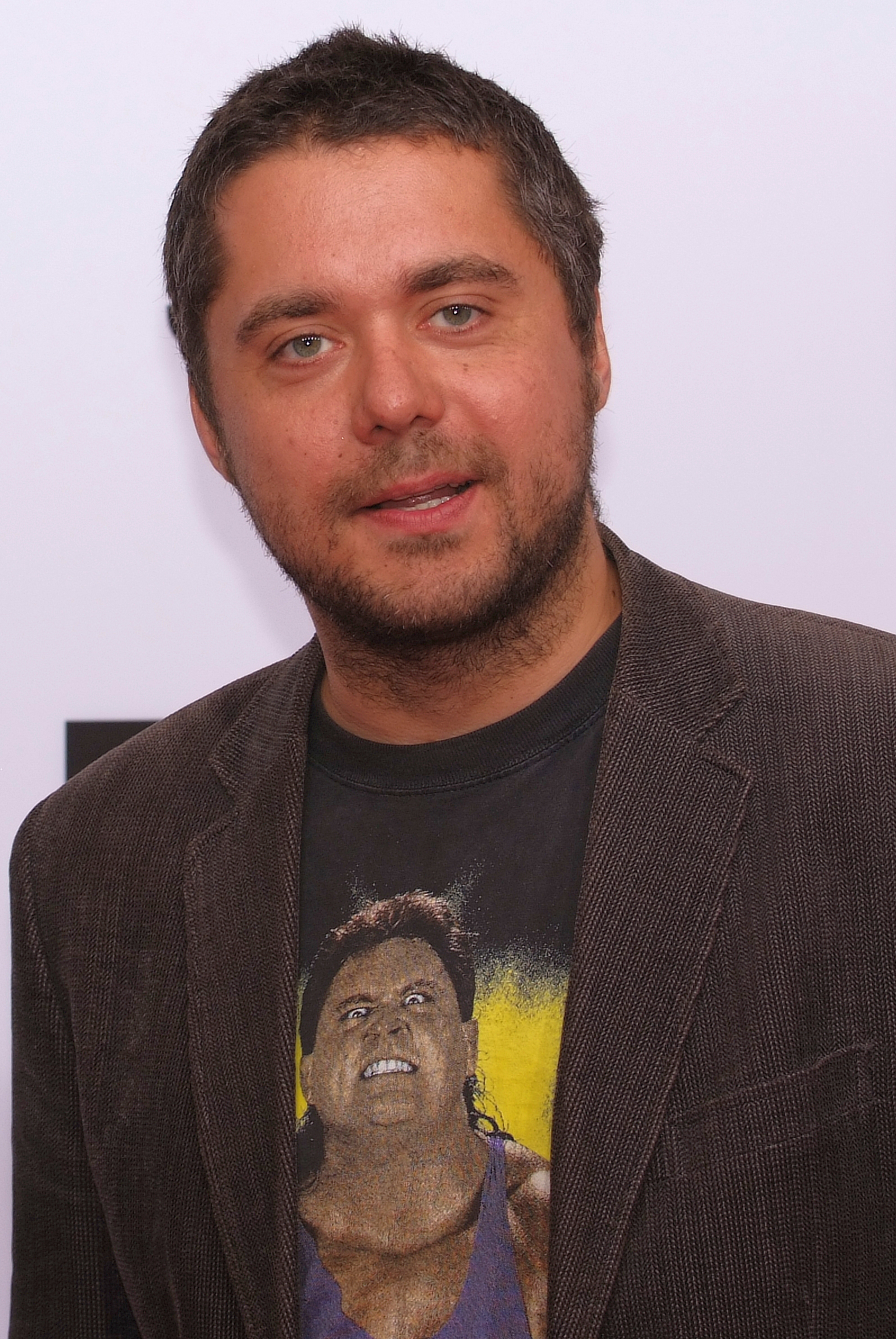 David Wnendt beim Studio Hamburg Nachwuchspreis 2012